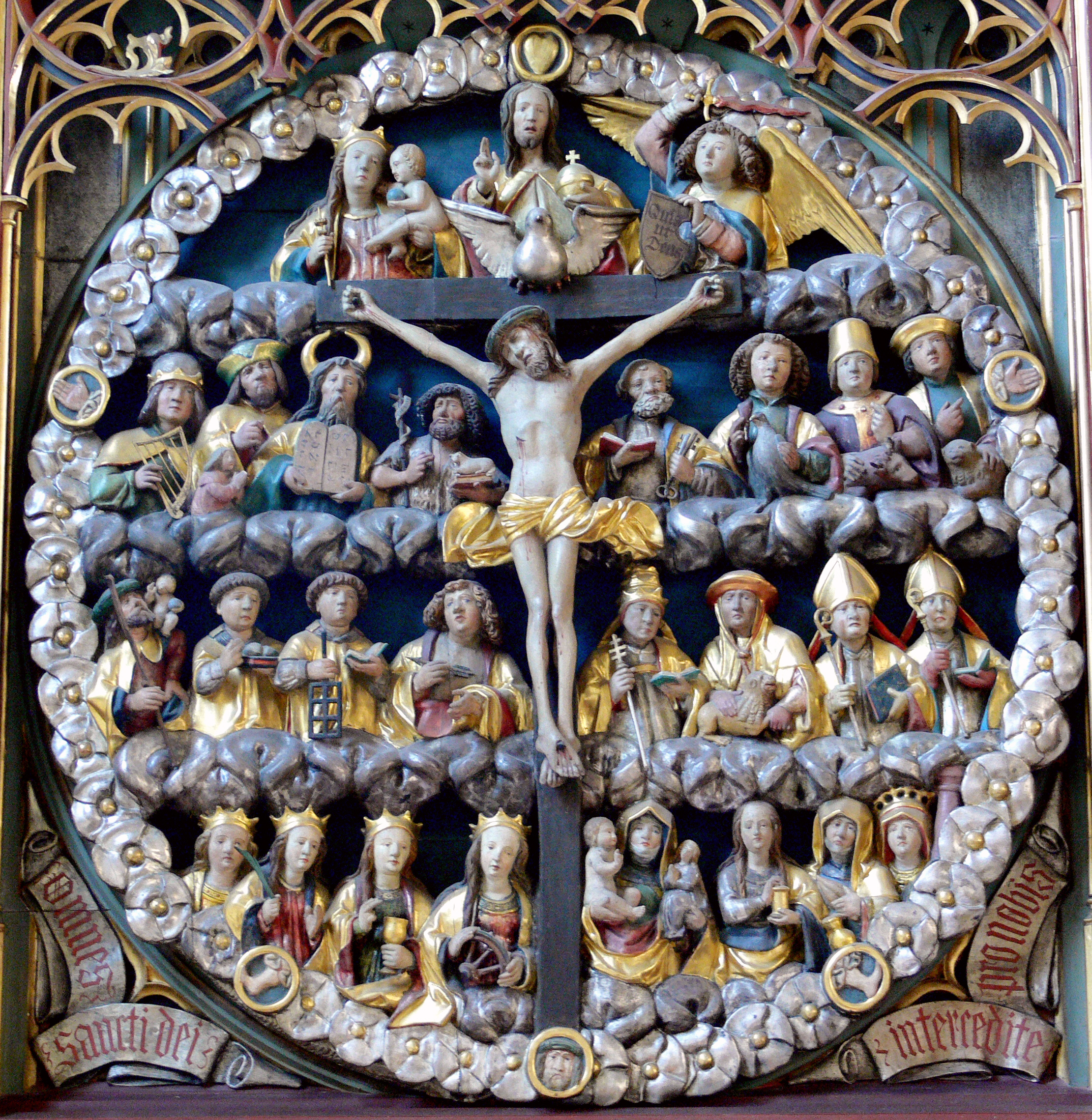 Liebfrauenmünster, Wolframs-Eschenbach, Landkreis Ansbach Rosenkranzaltar (wohl von einem Schüler des Veit Stoß, um 1510); Mittelschrein